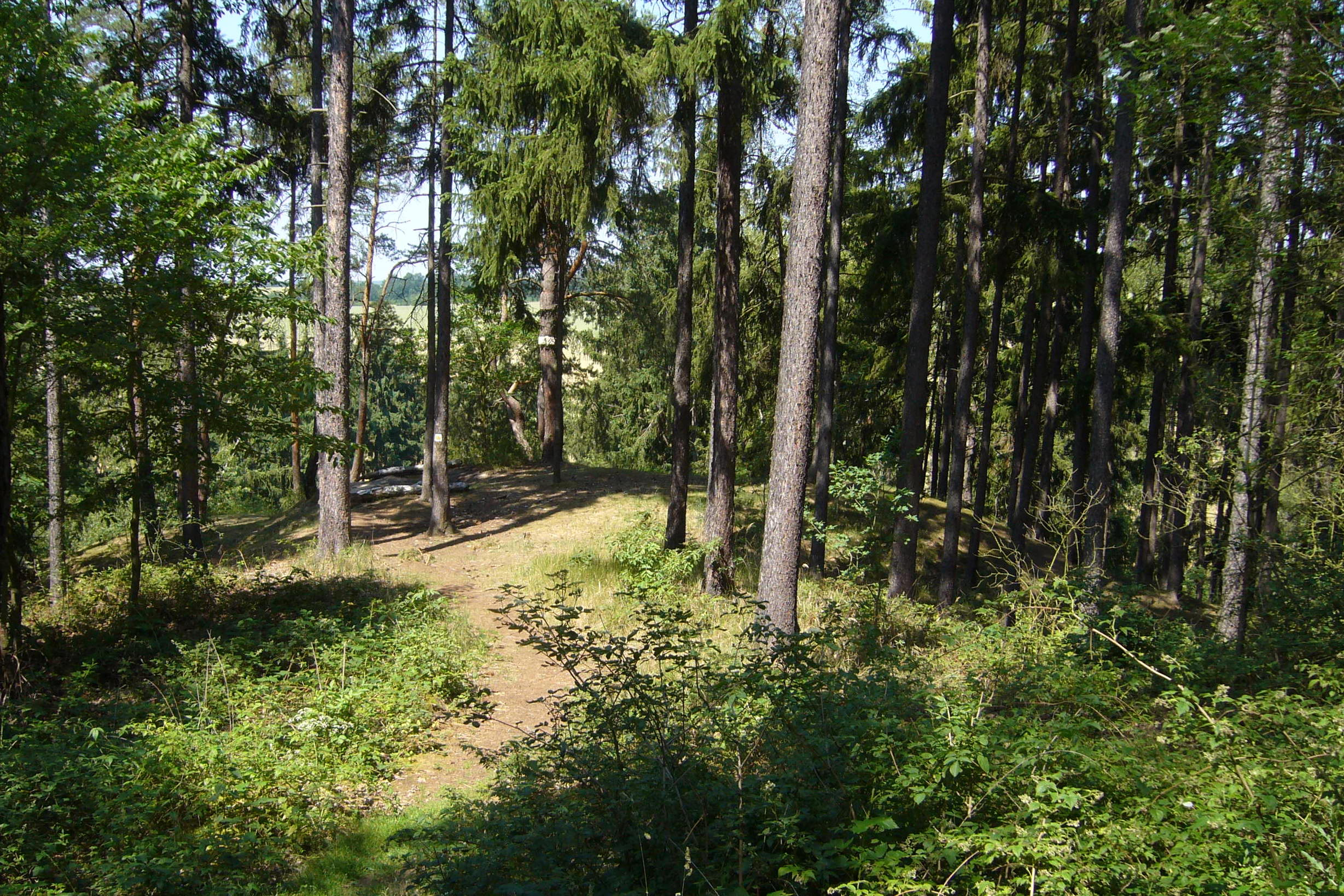 Hrad Kyjov u Malesic - hradní jádro